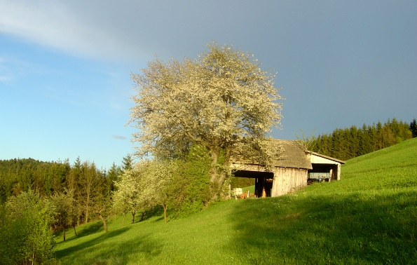 Landschaft